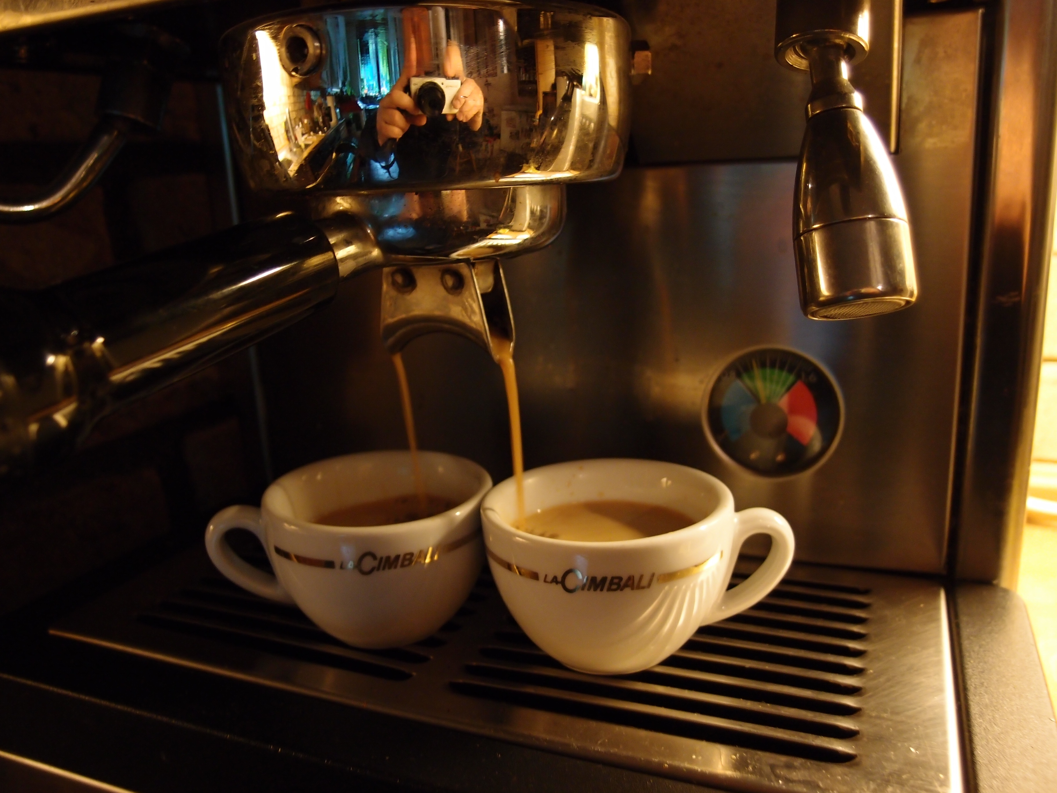 Zwei Espressos, hergestellt mit Espressomaschine La Cimbali M21 Junior Datum: 20.08.2011 Urheber: M. Pfeiffer alias Benutzer:Gordito1869 Quelle: privates Fotoarchiv des Urhebers